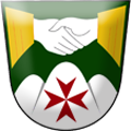 znak obce Sousedovice